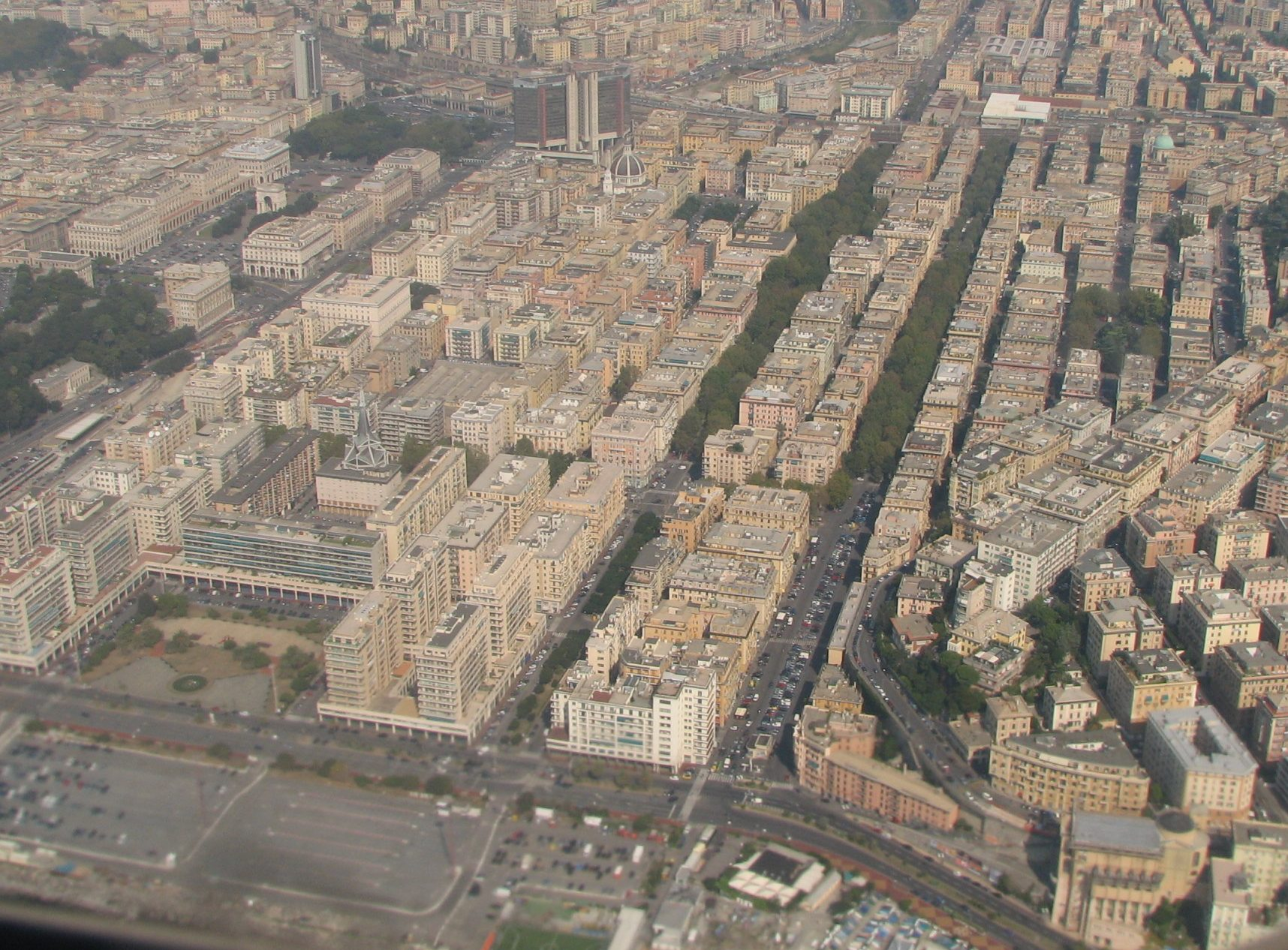 Veduta aerea del quartiere della Foce di Genova, visto da Sud.